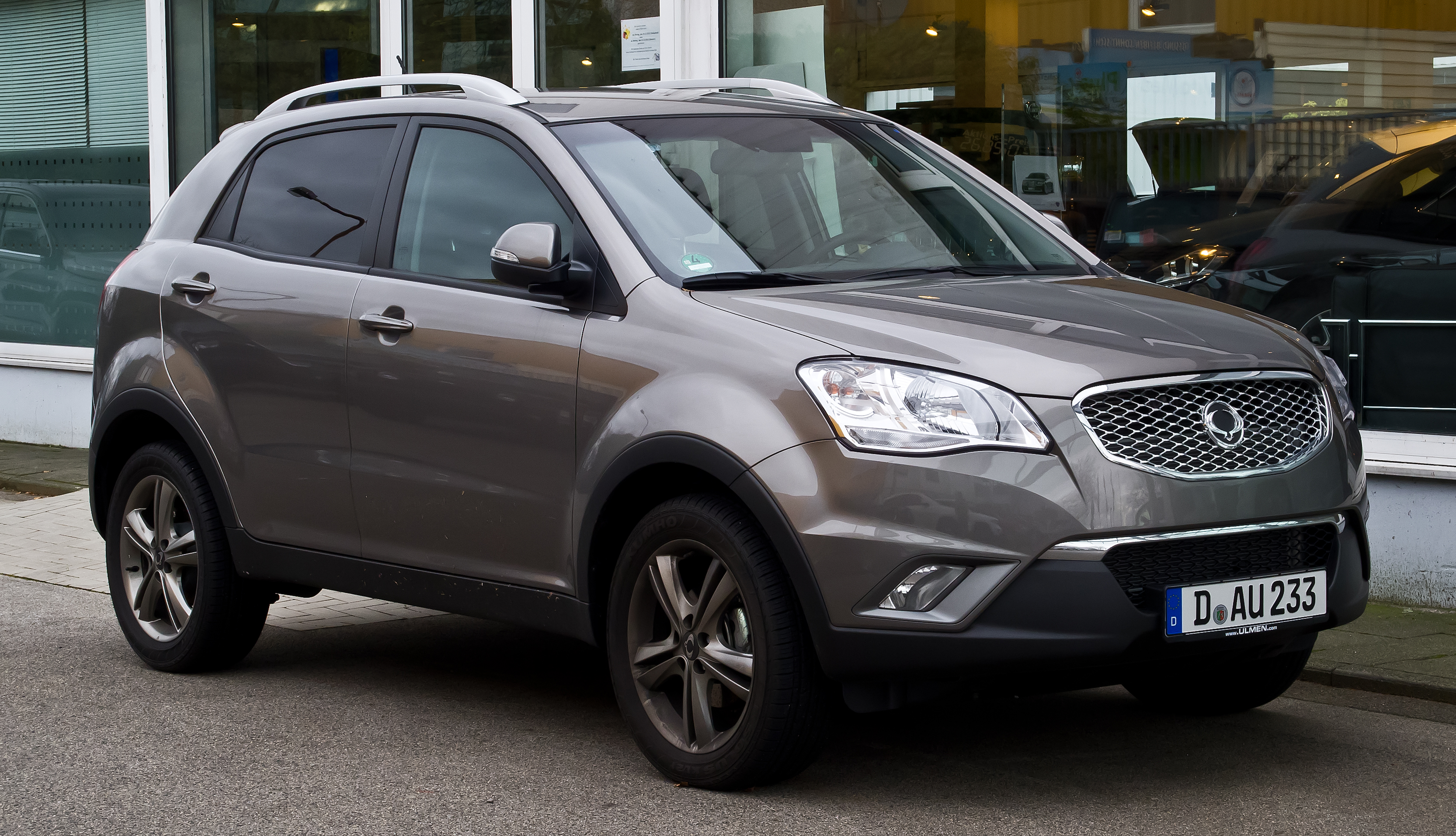 SsangYong Korando e-XDi 200 4WD Sapphire (V)